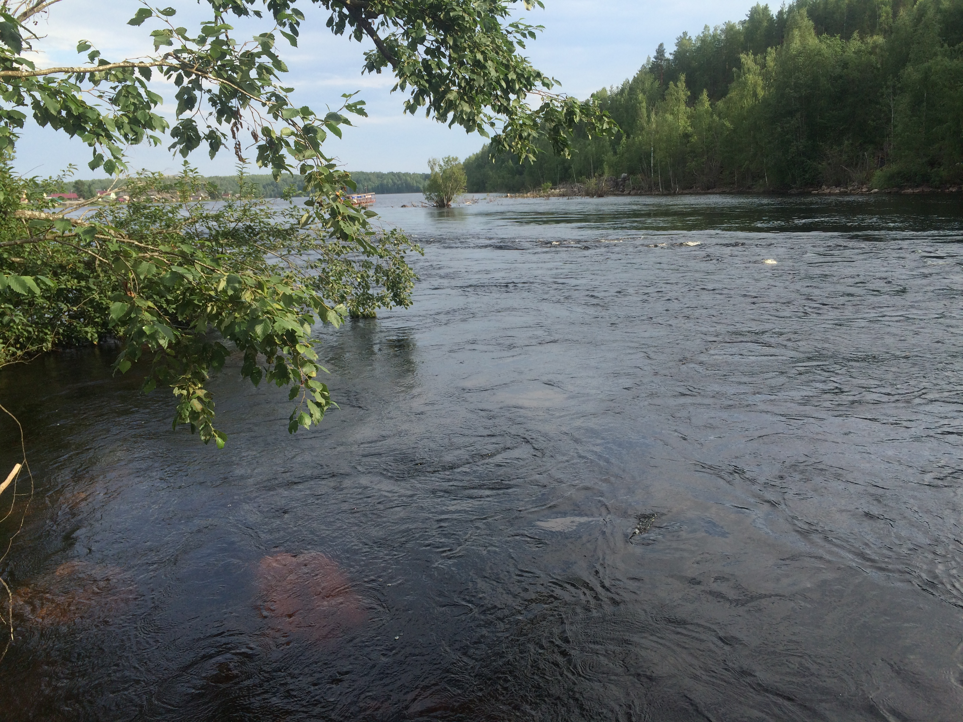 Заводская протока.